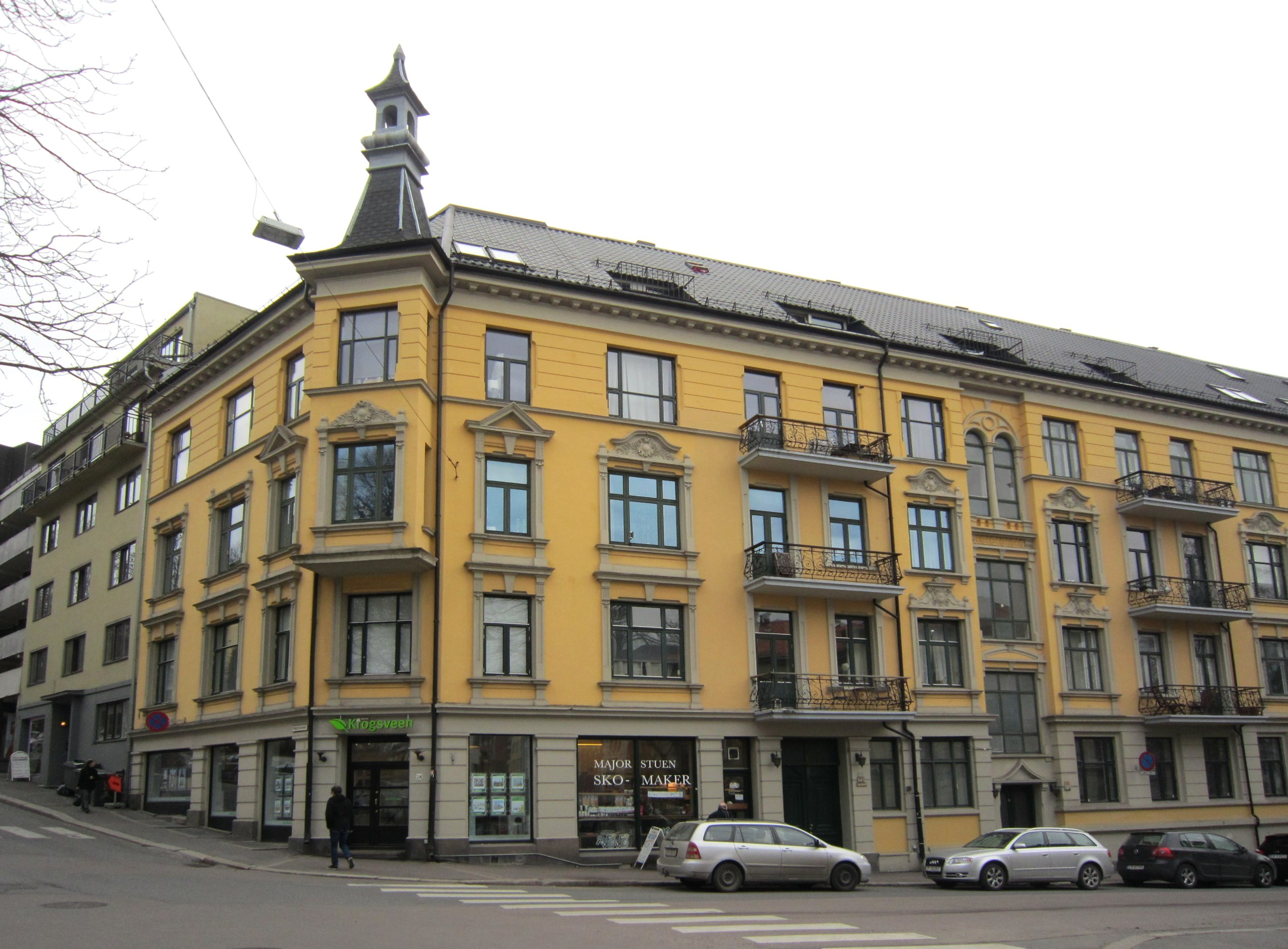 Fra krysset mellom Majorstuveien (t.v.) og Maries gate (t.h.). Den avbildede hjørnegården har adresse Majorstuveien 28.